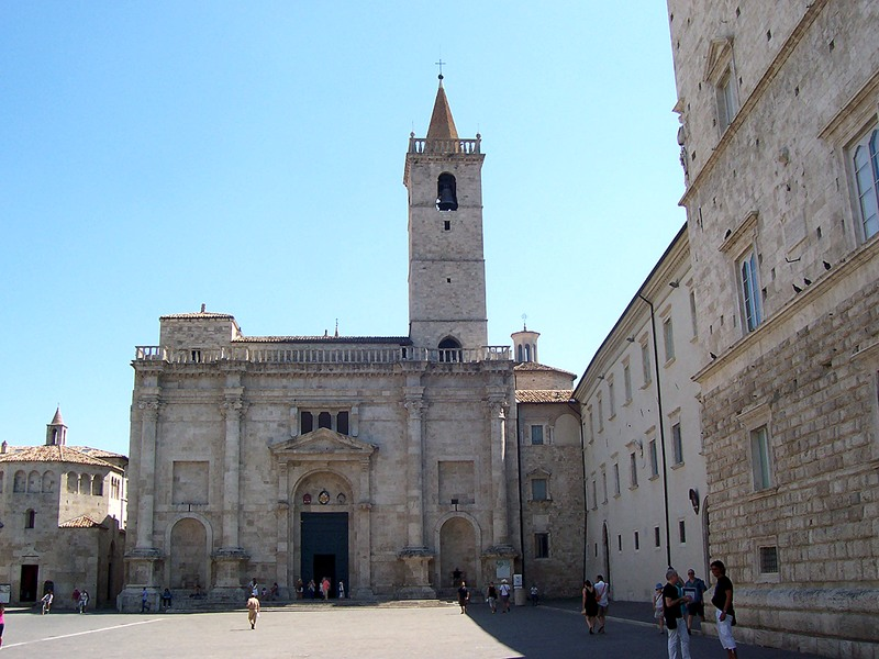 Ascoli Piceno - Duomo